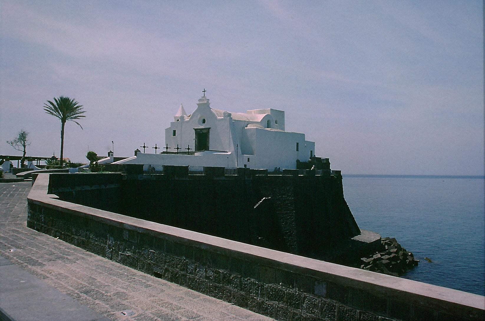 Die Kirche Santa Maria del Soccorso in Forio auf der Insel Ischia, fotografiert von Andreas Wahra am 6. Mai 2003